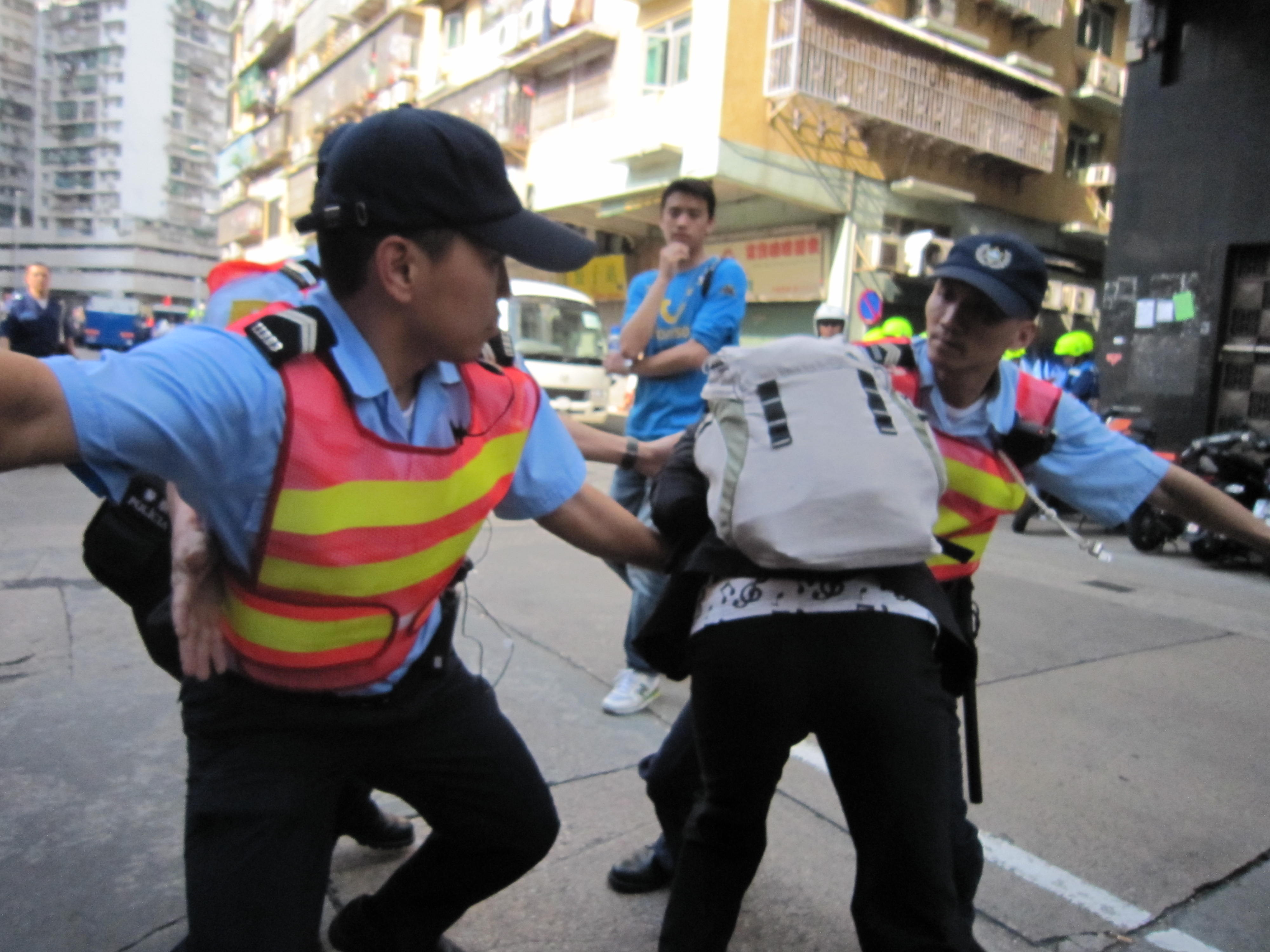 Procissão em Macau em 1 de Maio de 2010